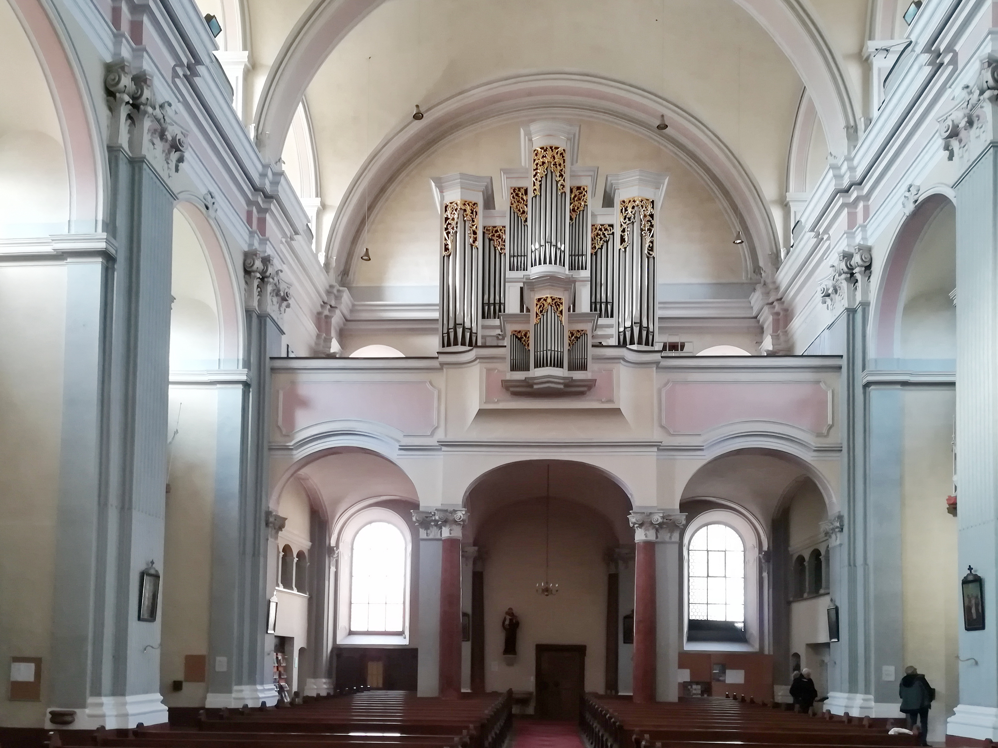 Die Stadtpfarrkirche Schärding befindet sich in der Stadt Schärding im gleichnamigen Bezirk Schärding von Oberösterreich (Kirchengasse 6). Sie ist dem Hl. Georg geweiht.